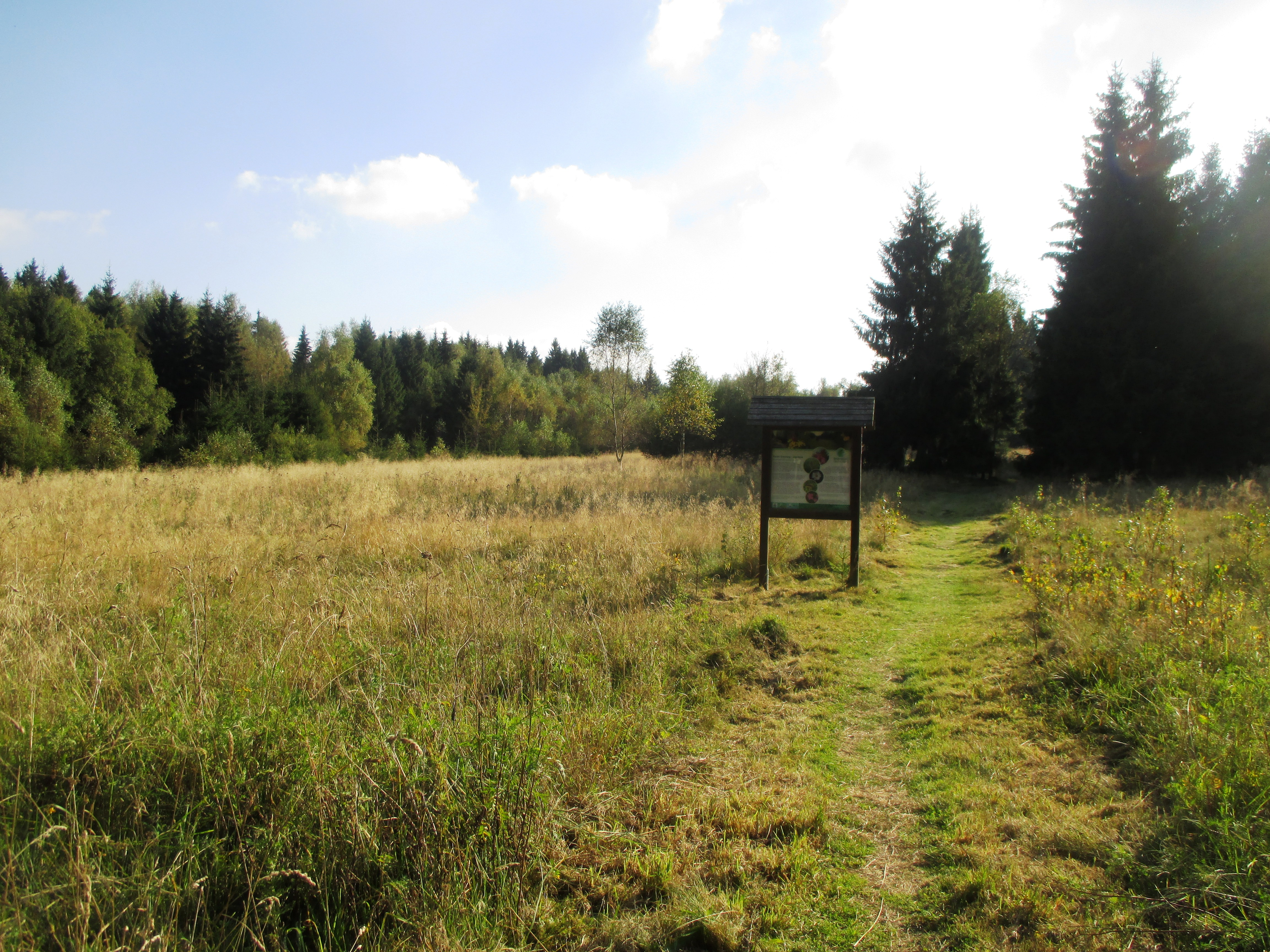 Am Drei-Länder-Stein bei Rothesütte, Stadt Ellrich